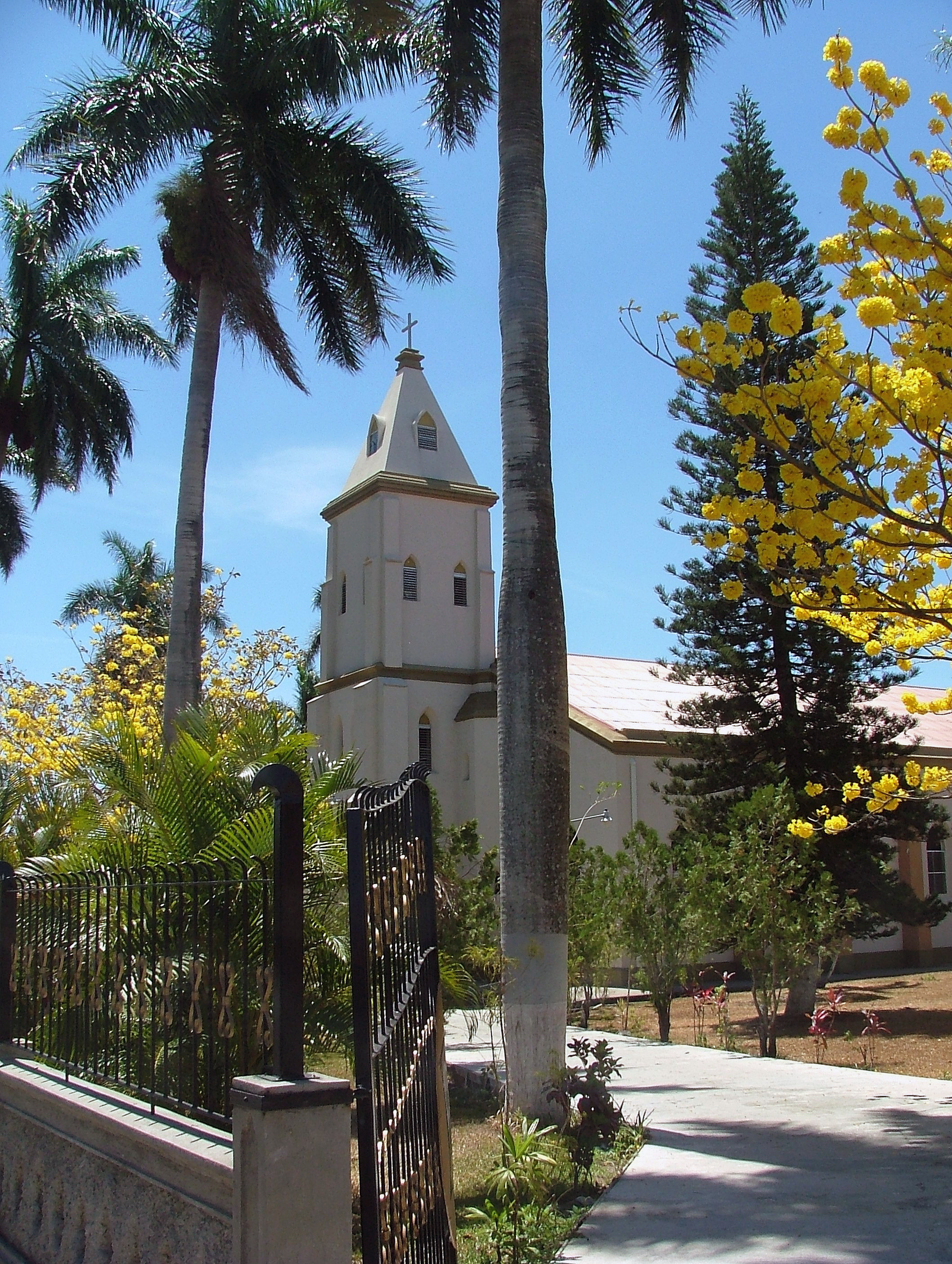 Iglesia de Atenas, provincia de Alajuela, Costa Rica.